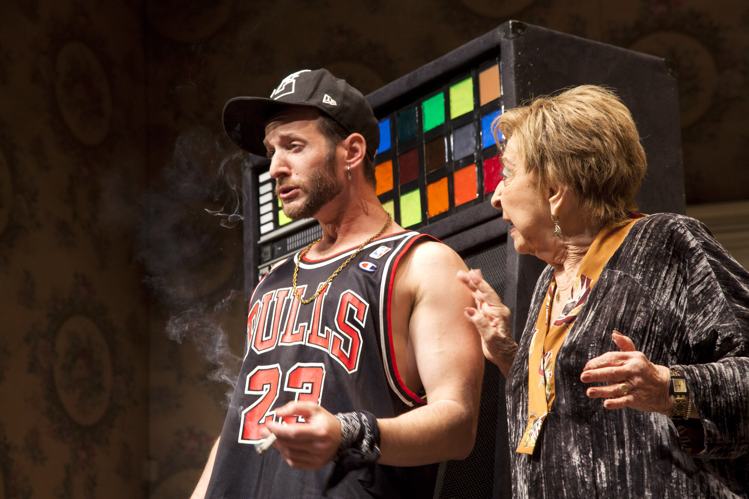 שחר רז בתפקיד הראפר בהצגה "מה עושים עם ג'ני"